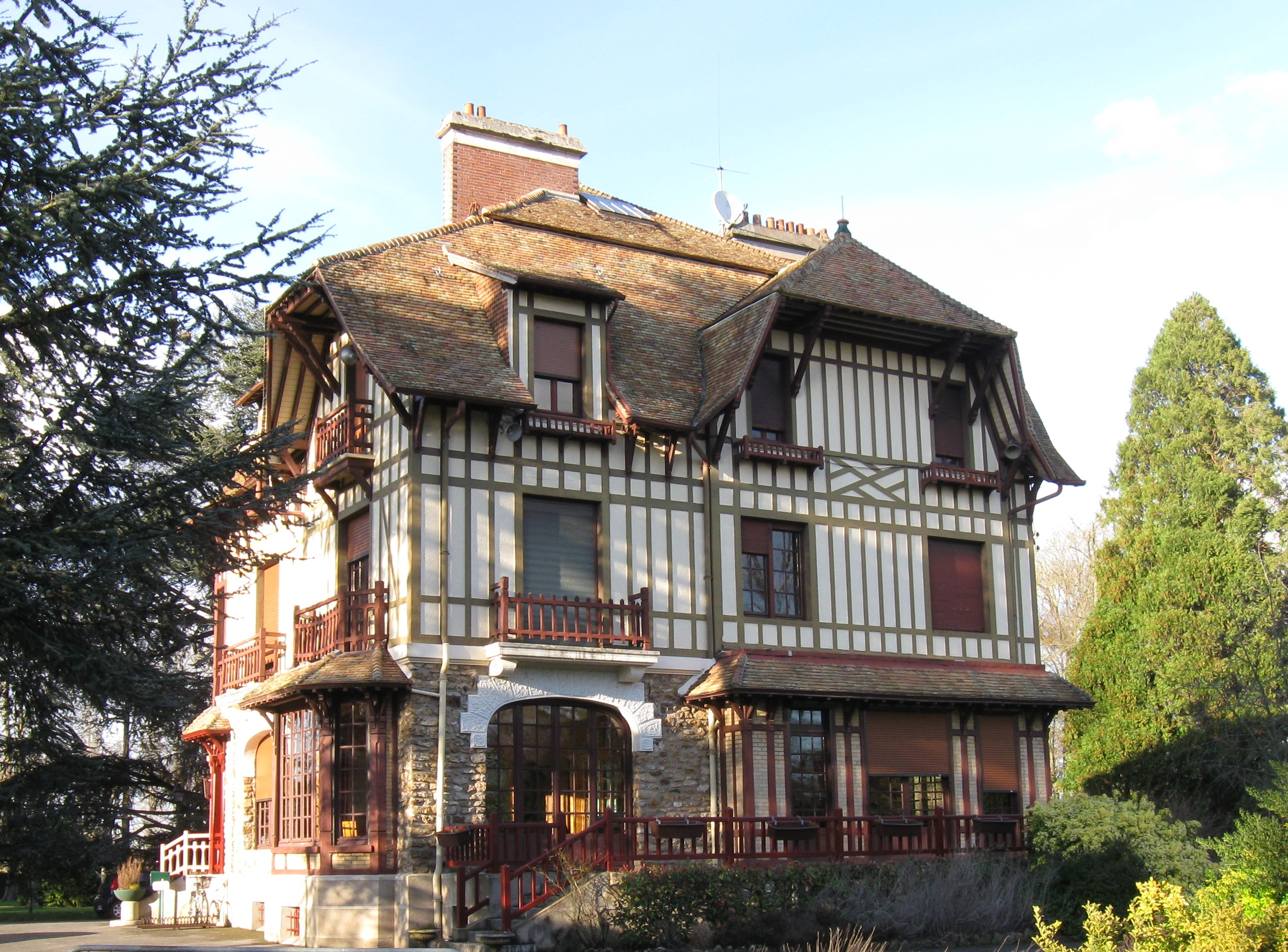 Mairie de Villiers-en-Bière. (Seine-et-Marne, région Île-de-France).